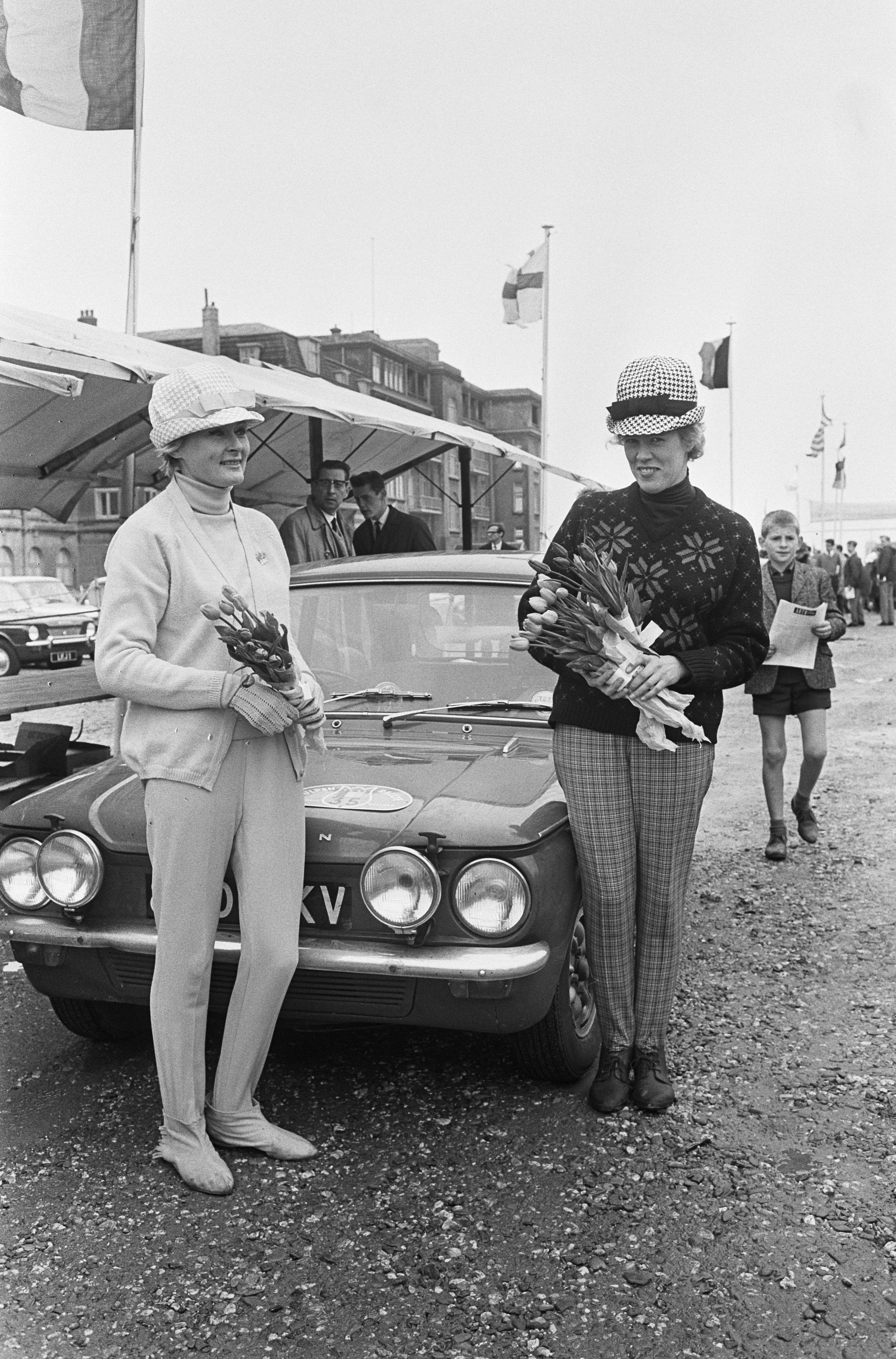 Collectie / Archief : Fotocollectie Anefo Reportage / Serie : Tulpenrally 1965 Beschrijving : Tulpenrallye 1965, de Engelse dames Rosemary Smith en Valerie Domleo met een Hillman Imp Annotatie : Zij wonnen de ralley Datum : 28 april 1965 Locatie : Noordwijk, Zuid-Holland Trefwoorden : autorally's, autosport, sport Persoonsnaam : Domleo, Valerie, Smith, Rosemary Instellingsnaam : Tulpenrally Fotograaf : Fotograaf Onbekend / Anefo Auteursrechthebbende : Nationaal Archief Materiaalsoort : Negatief (zwart/wit) Nummer archiefinventaris : bekijk toegang 2.24.01.05 Bestanddeelnummer : 917-7085